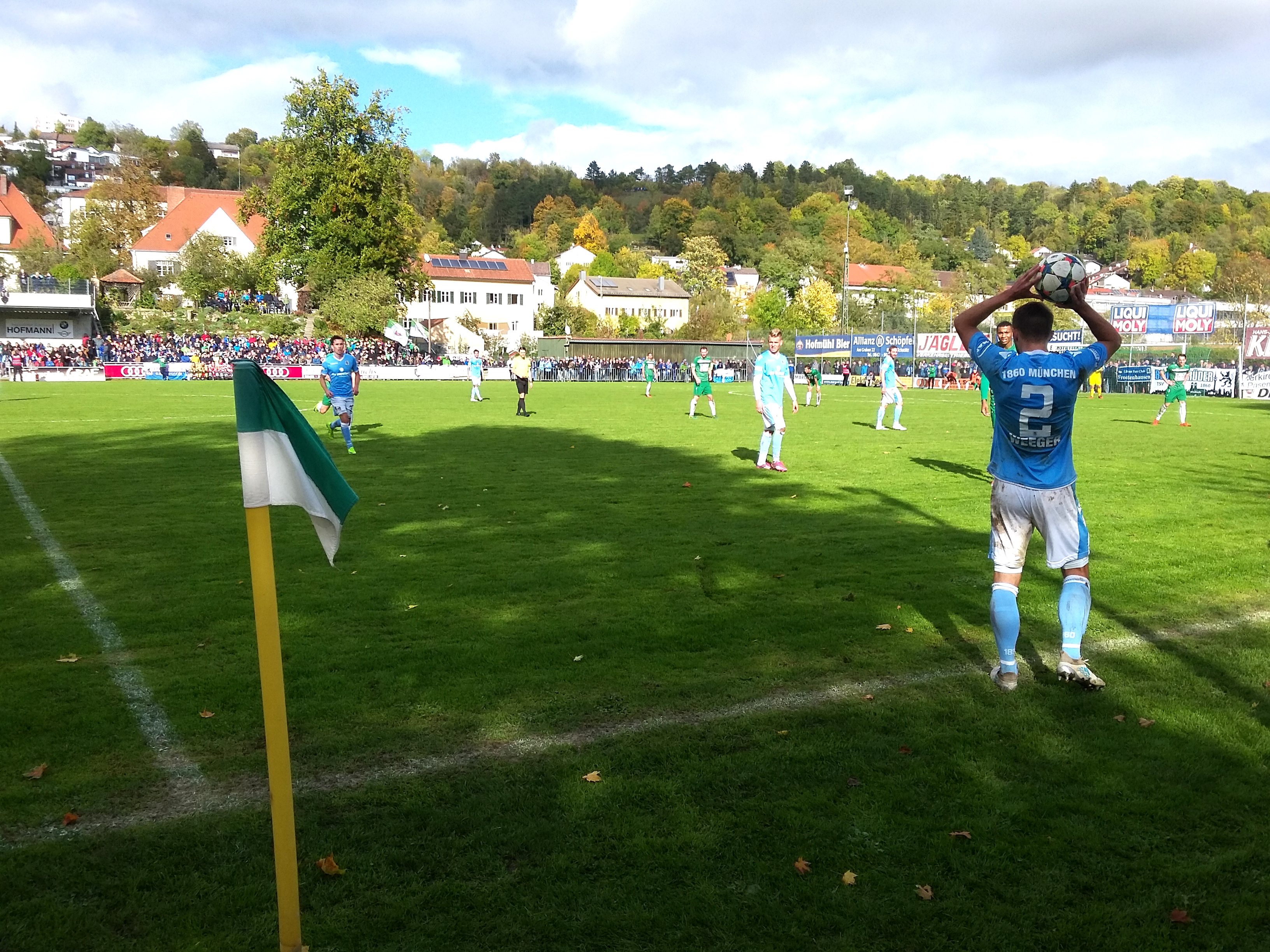 Einwurf für den TSV 1860 München beim Spiel der Regionalliga Bayern zwischen dem VfB Eichstätt und dem TSV 1860 München (1:2) am 3. Oktober 2017